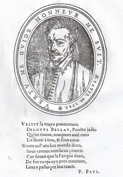 Edition de Bellaud